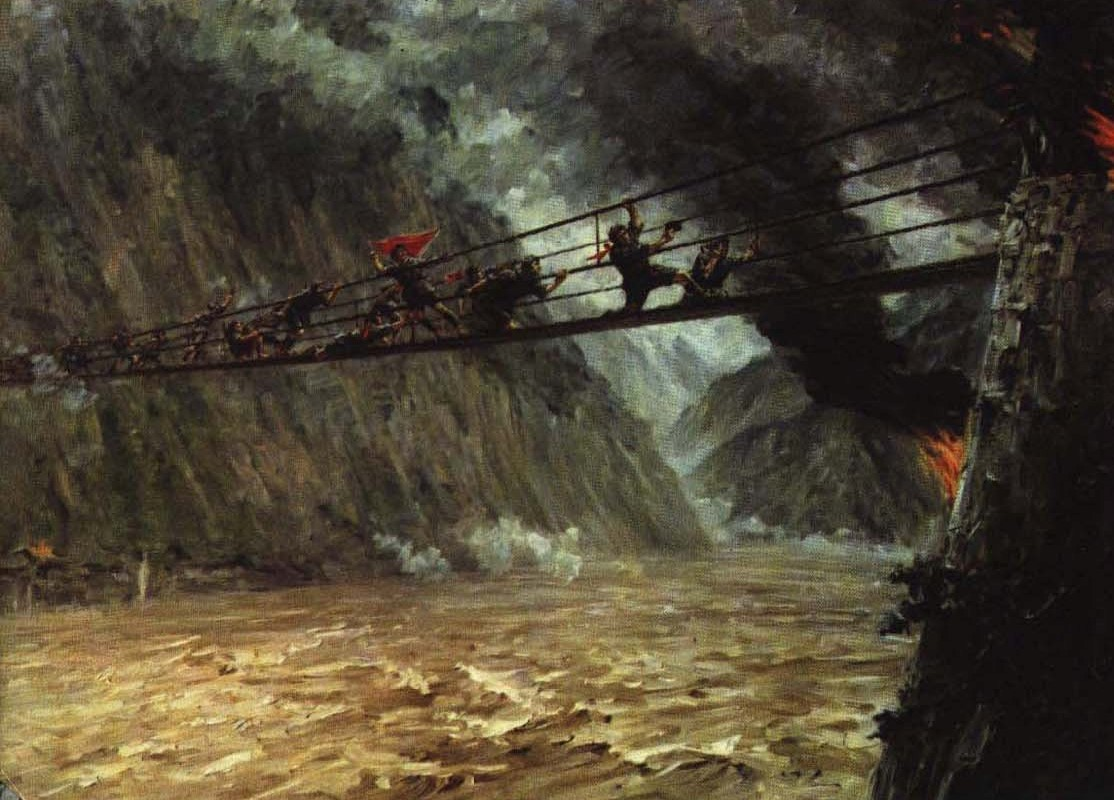 1965-7 1965年 刘国枢《飞夺泸定桥》